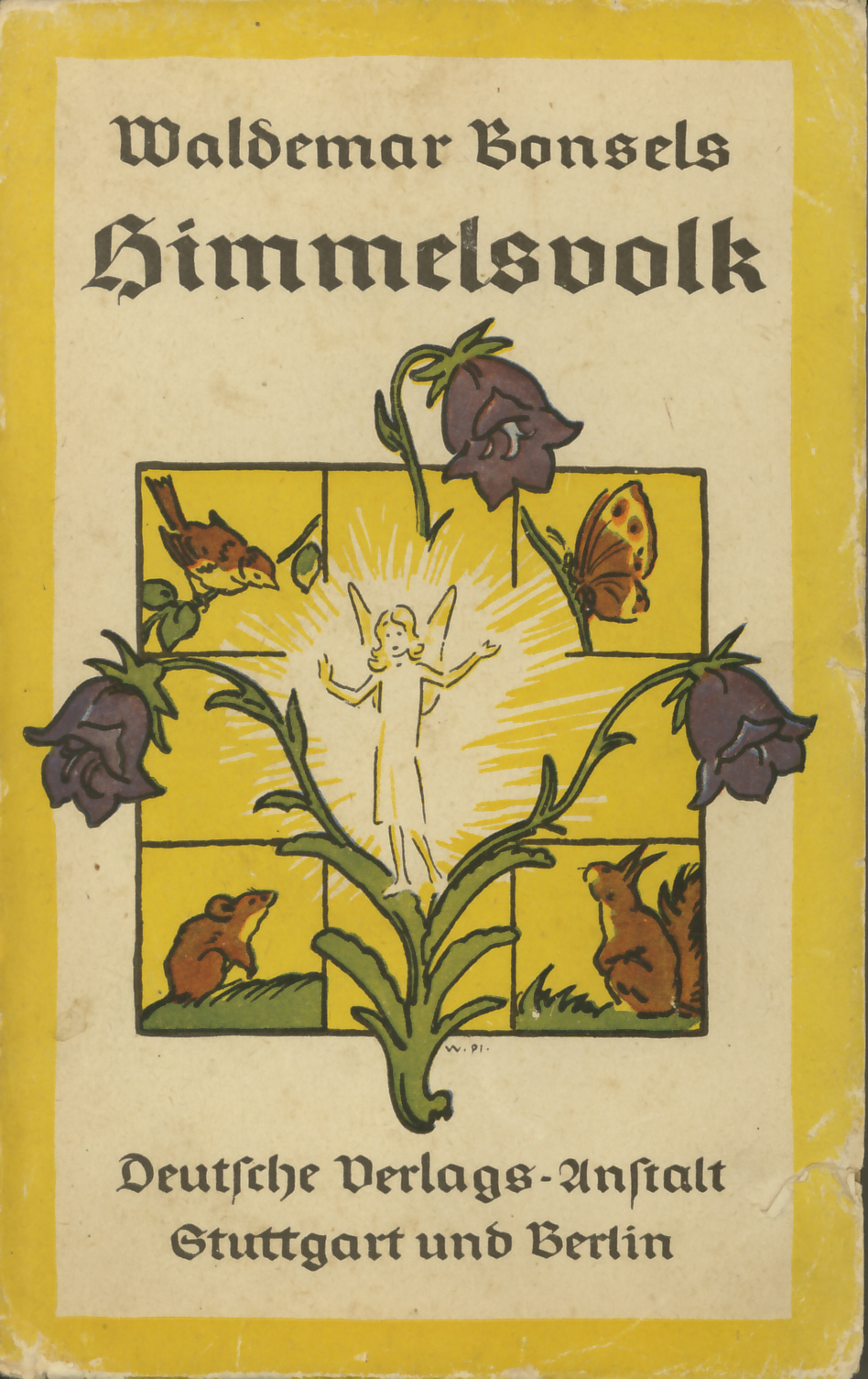 Waldemar Bonsels, Himmelsvolk. Deutsche Verlags-Anstalt: Stuttgart und Berlin, o.J. (ca. 1920)